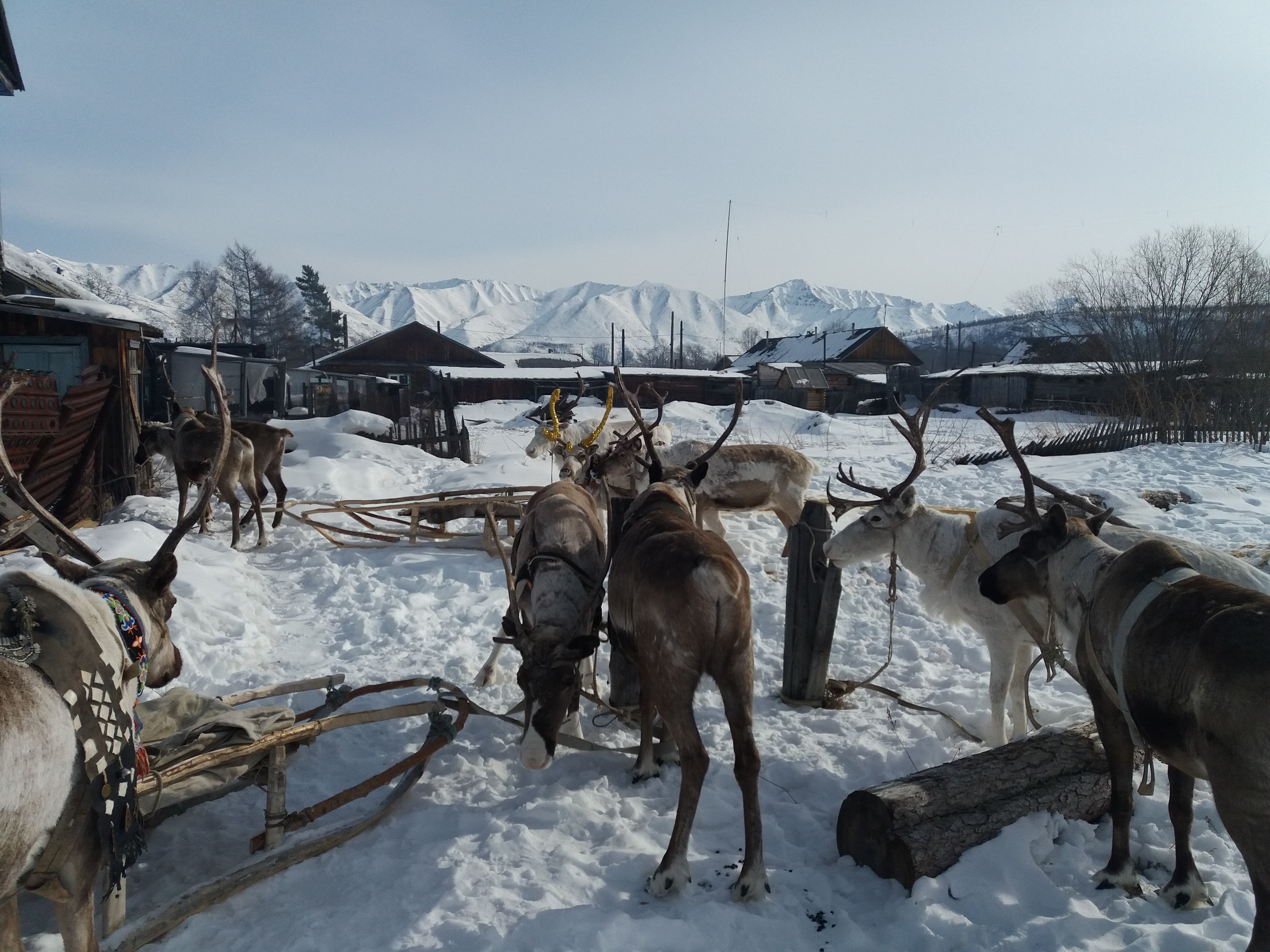 У бывшего аркинского аэропорта